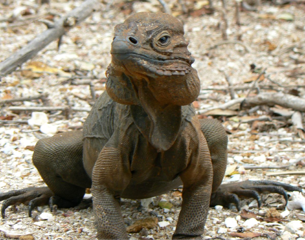 Male Rhinoceros Iguana, Pedernales Province, Dominican Republic